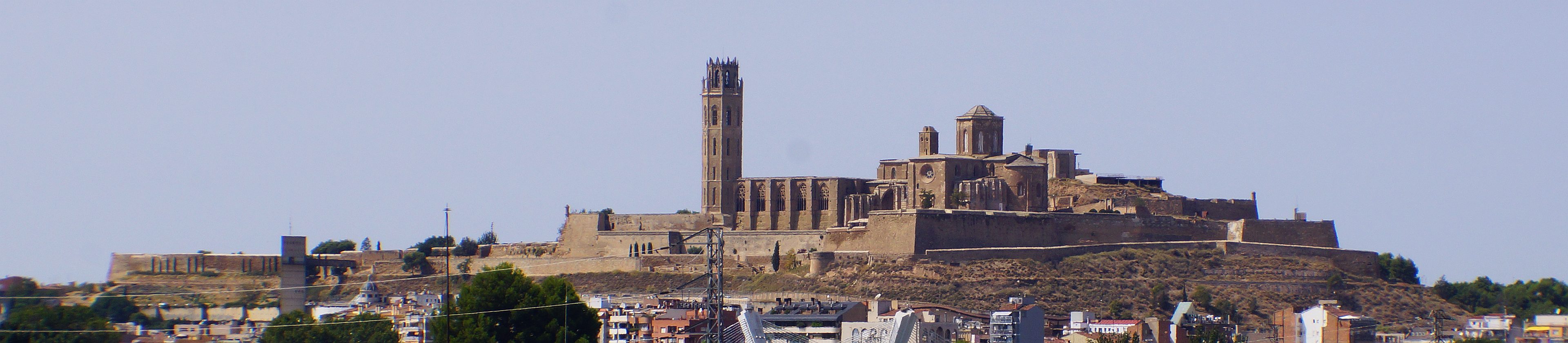 Panorama Ost-Ansicht Seu Vella, alte ehemalige gotisch-romanische Kathedrale, erbaut als Bischofssitz und Ensemble mit Befstigungen und diversen Erweiterungen von 1286 bis 1431, umgebaut ab 1707 zu einer militärischen Festungs- und Kasernenanlage auf dem Hügel Turó de la Seu Vella innerhalb der Stadt Lleida (Lérida) in Spanien Foto 2017 Wolfgang Pehlemann DSC06840